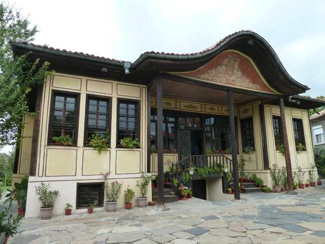 галерия манев